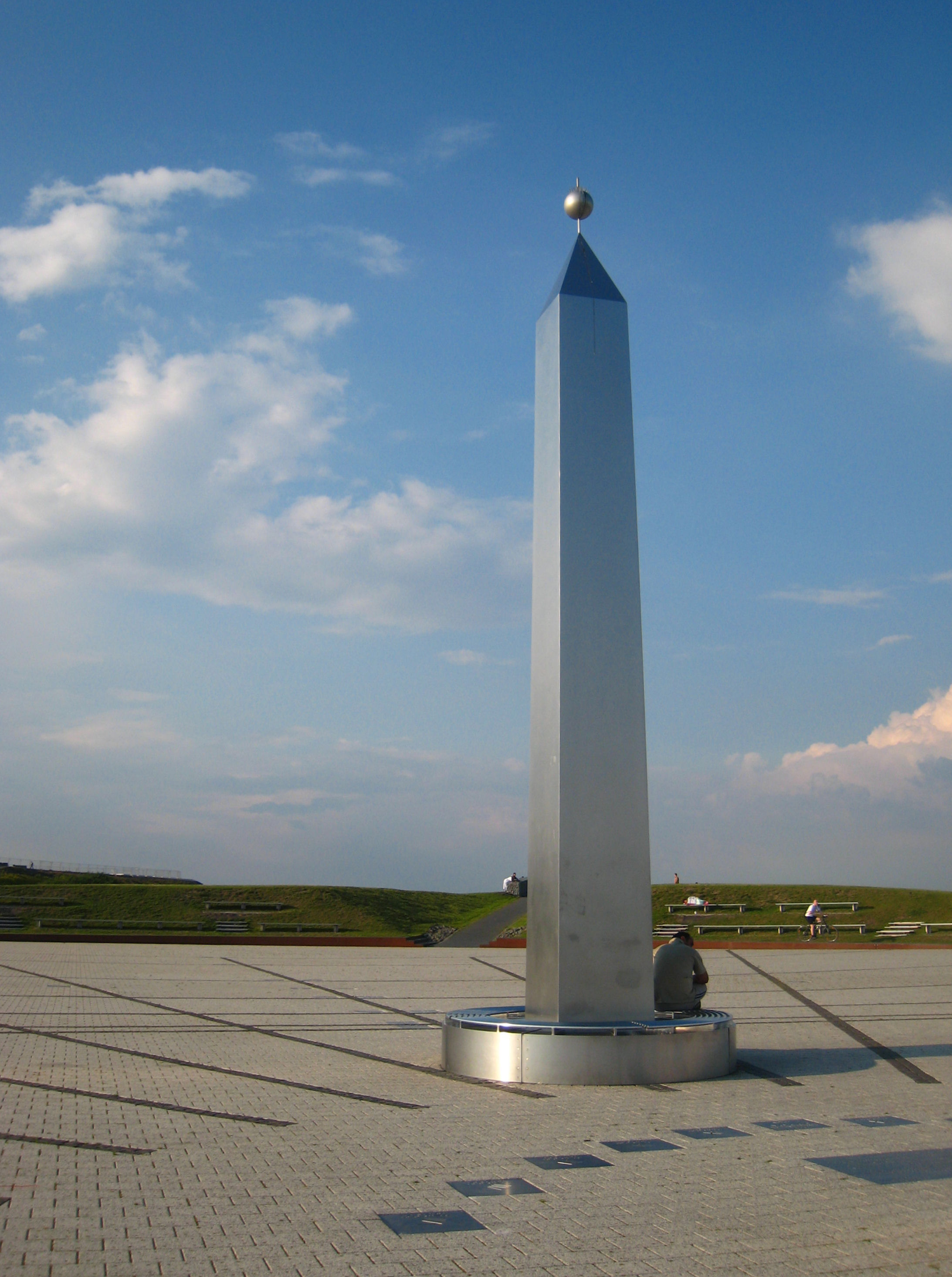 Obelisk der Sonnenuhr auf der Halde Hoheward, Herten, Recklinghausen, Deutschland